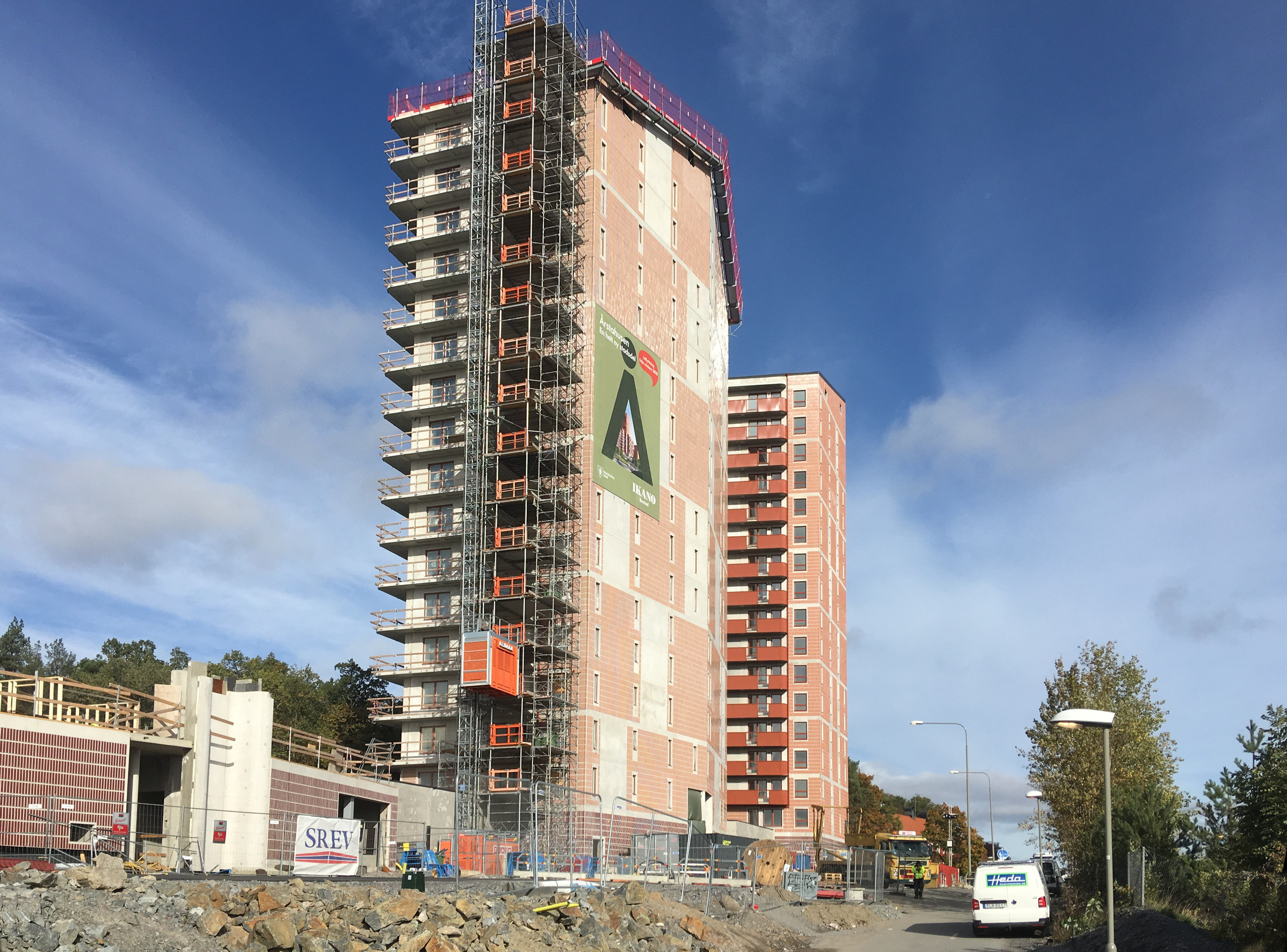 Årstahusen i Årstaberg